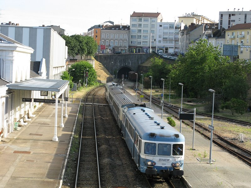 Composition Autorails X2800 en gare de Limoges Montjovis - Circulation organisée par l'association des Amis de l'x2800 en Limousin